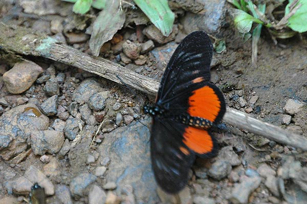 Uganda Bwindi SW Uganda